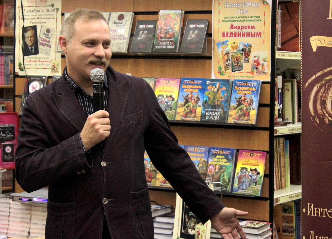 Andrei Belyanin